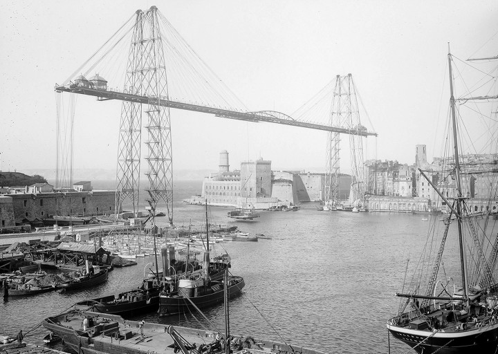 Titre(s) : [Marseille, 1900-1925] [Image fixe numérisée] / Frères Séeberger, photogr. Publication : [St Cyr] : [Direction du Patrimoine. Service des archives photographiques], [1900-1925] Editeur : France. Direction du patrimoine. Service des archives photographiques Note(s) : Acq. : Archives photographiques (Médiathèque du Patrimoine) (c) Caisse nationale des Monuments historiques Catégorie:Image de Marseille